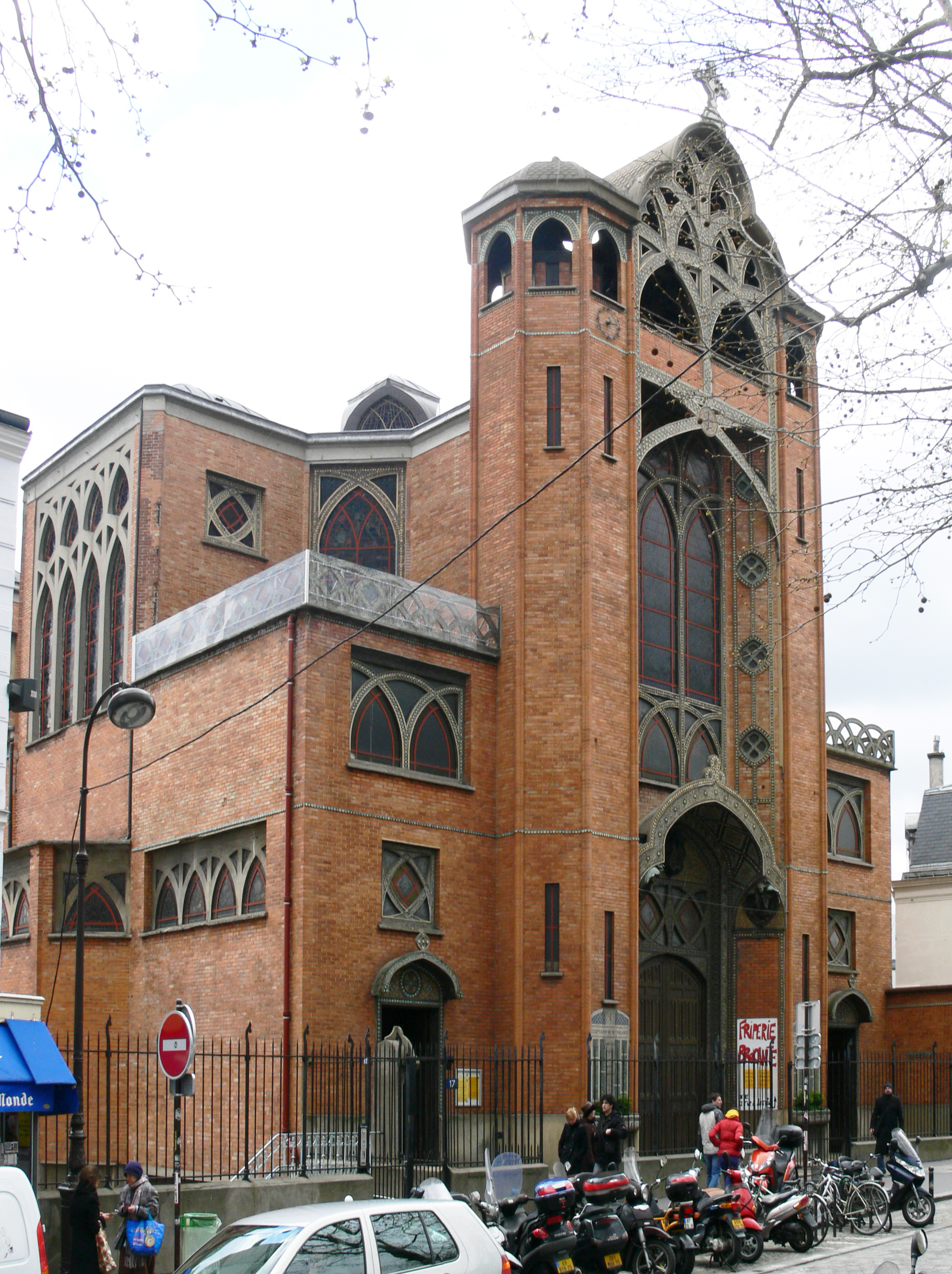 Église Saint-Jean-de-Montmartre, 19 rue des Abbesses, Paris (XVIIIe)